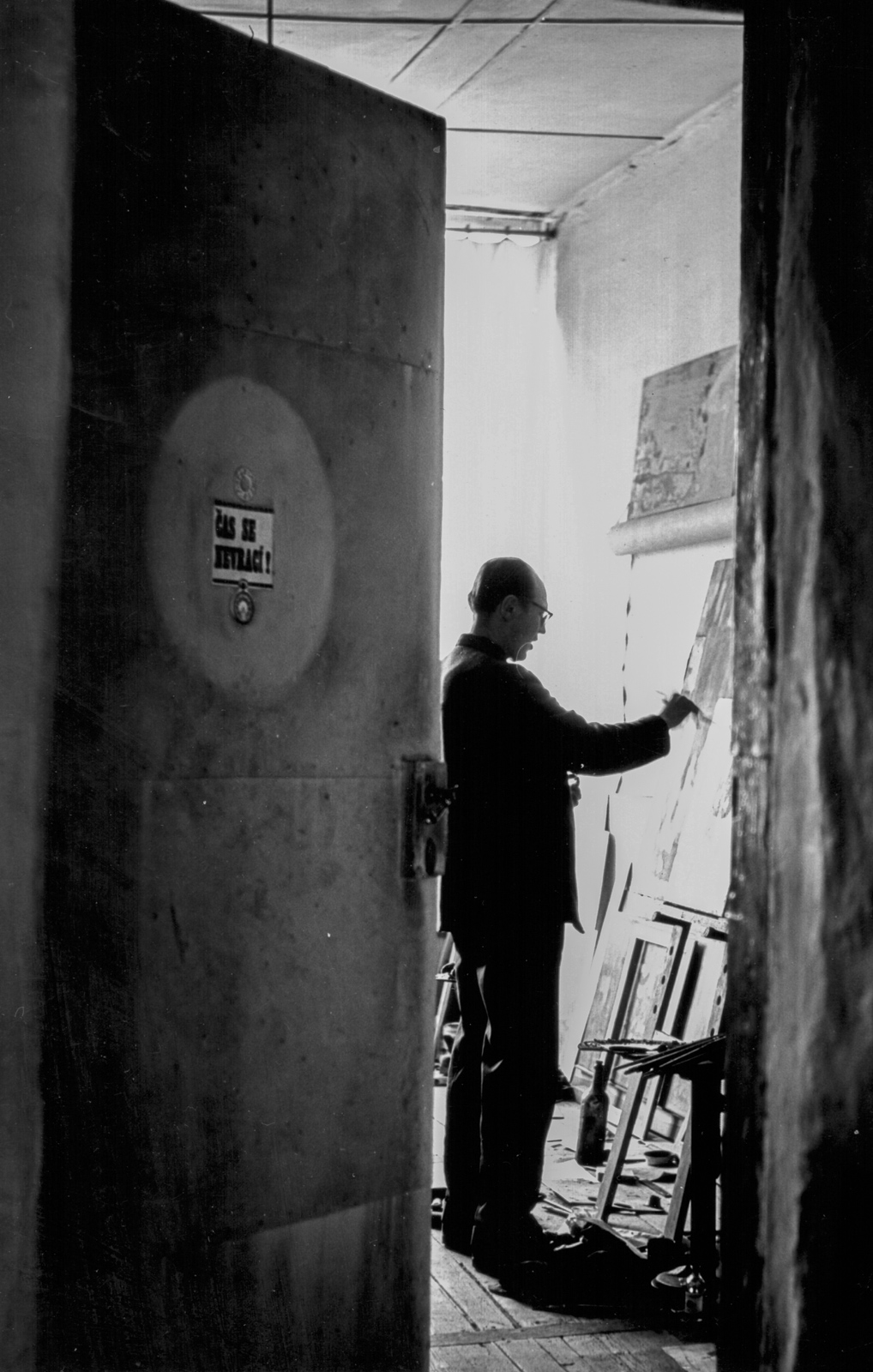 Čeněk Dobiáš v jeho atelieru